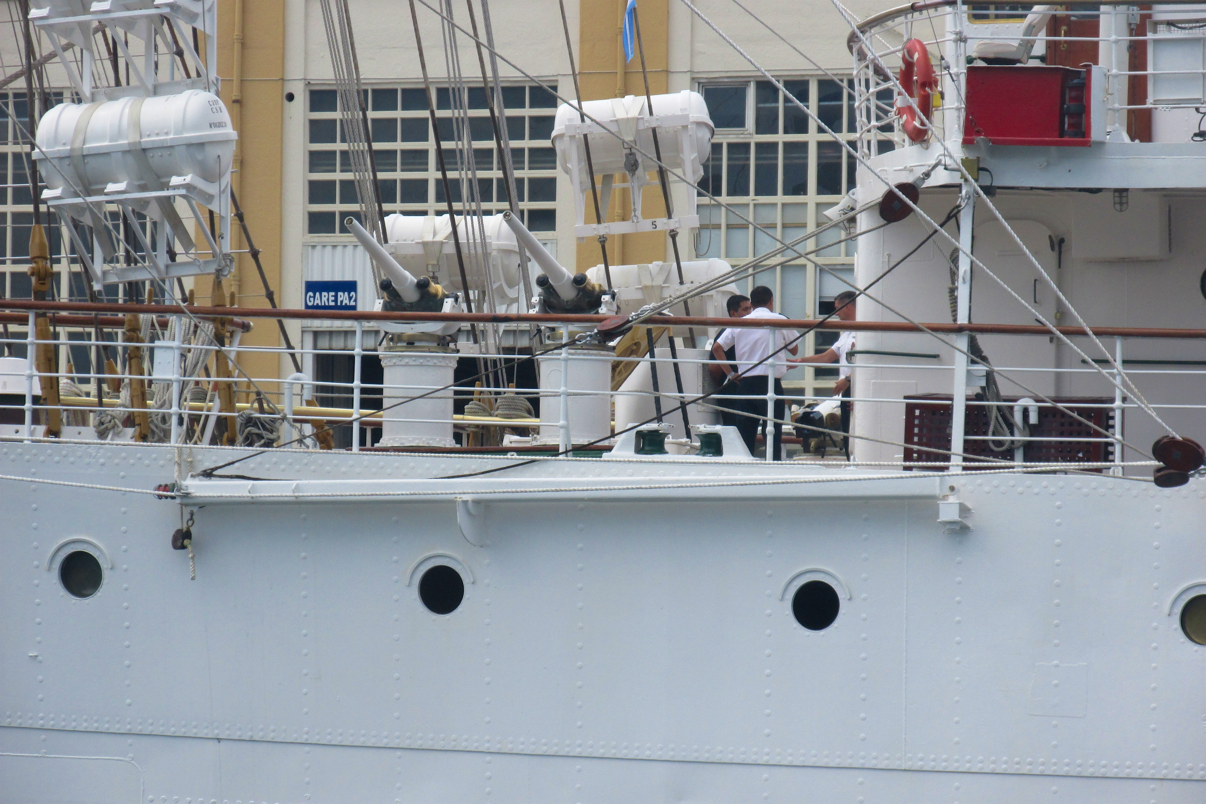 Canons sur le Libertad